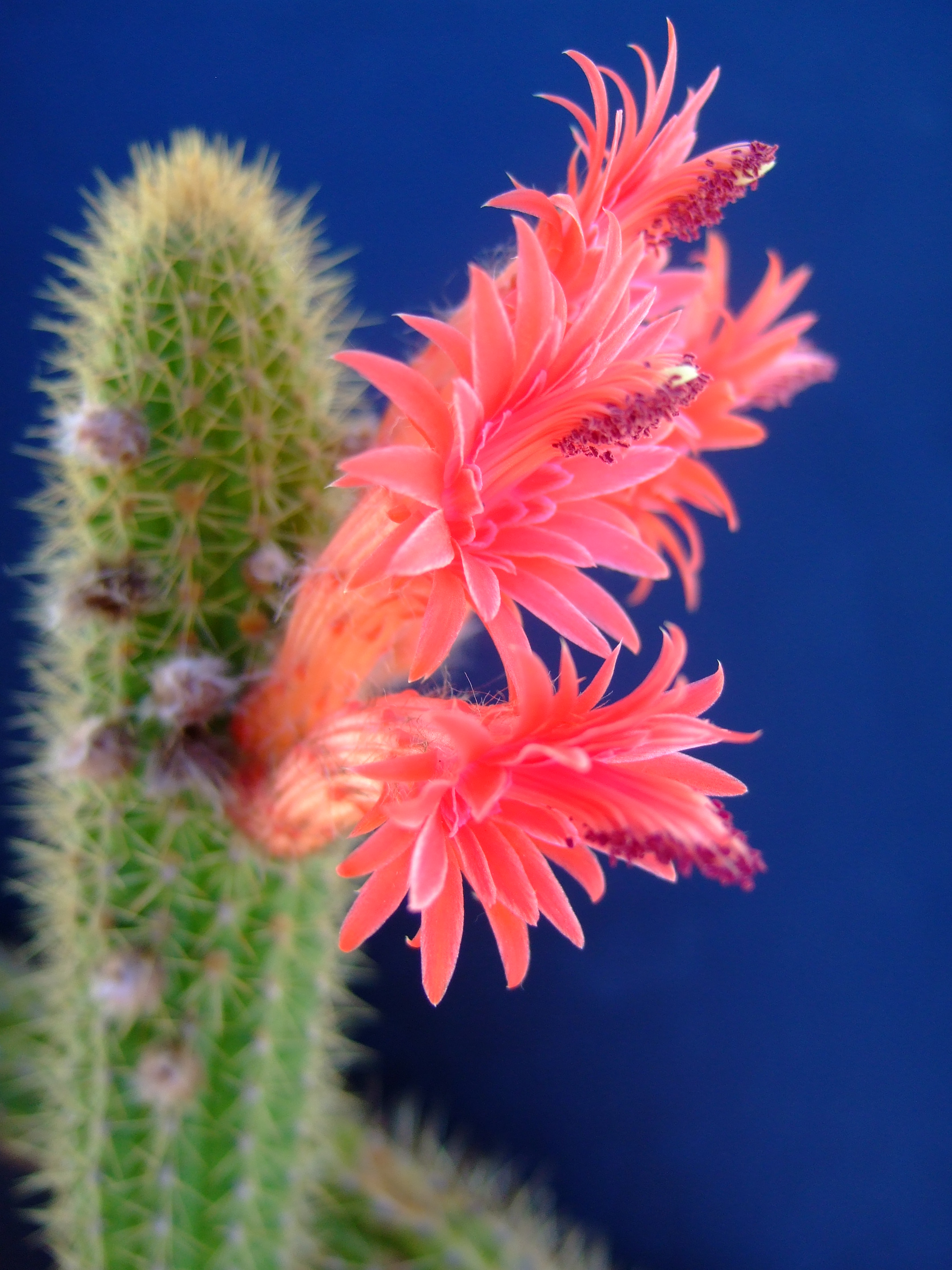 Cleistocactus samaipatanus (syn. Bolivicereus samaipatanus)